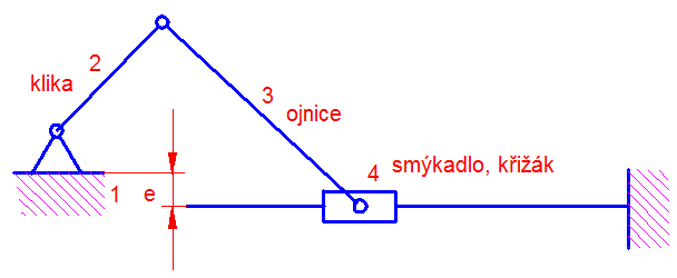 Obecný_klikový_mechanizmus.jpg